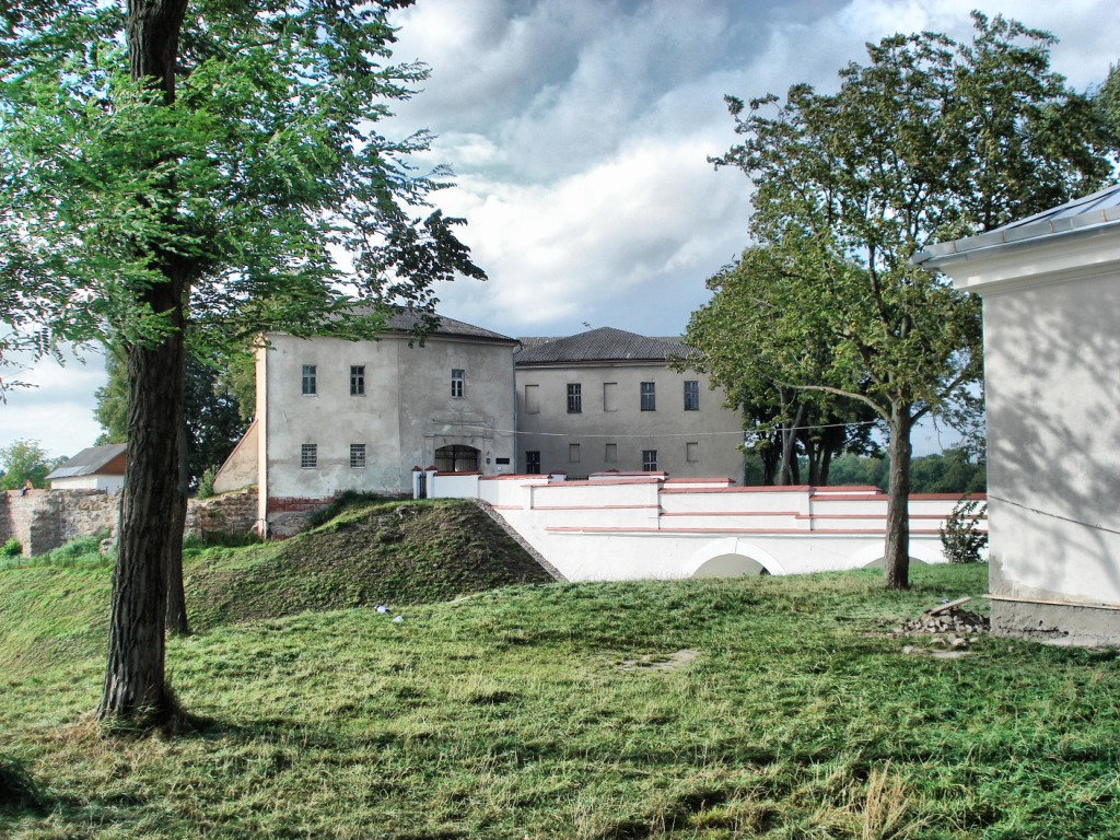 Беларуская (тарашкевіца): Комплекс Старога замка:палацфрагмэнт абарончых сьценНіжняя царква (руіны)Верхняя царква (рэшткі)княжацкі хорам (руіны)мостзамчышча. г. Горадня This is a photo of Belarusian heritage monument. Reference number: 411Г000003 ( WLM)